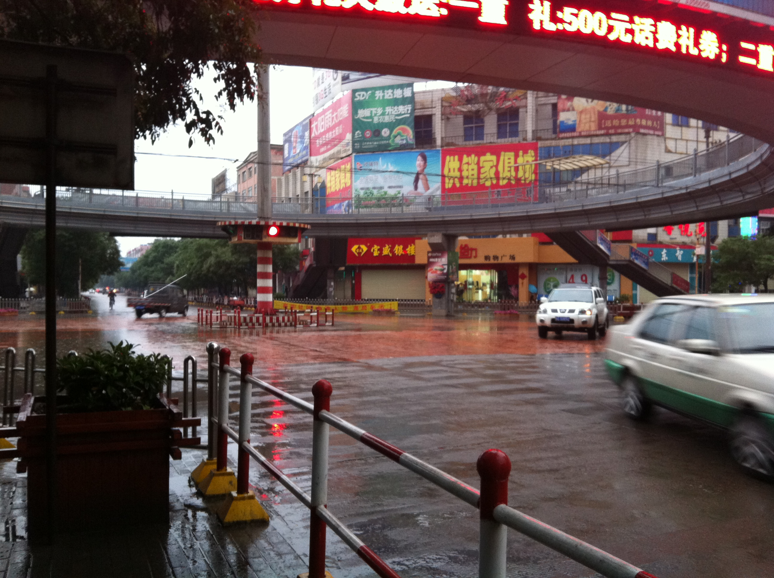 Shandan, Zhangye, Gansu, China